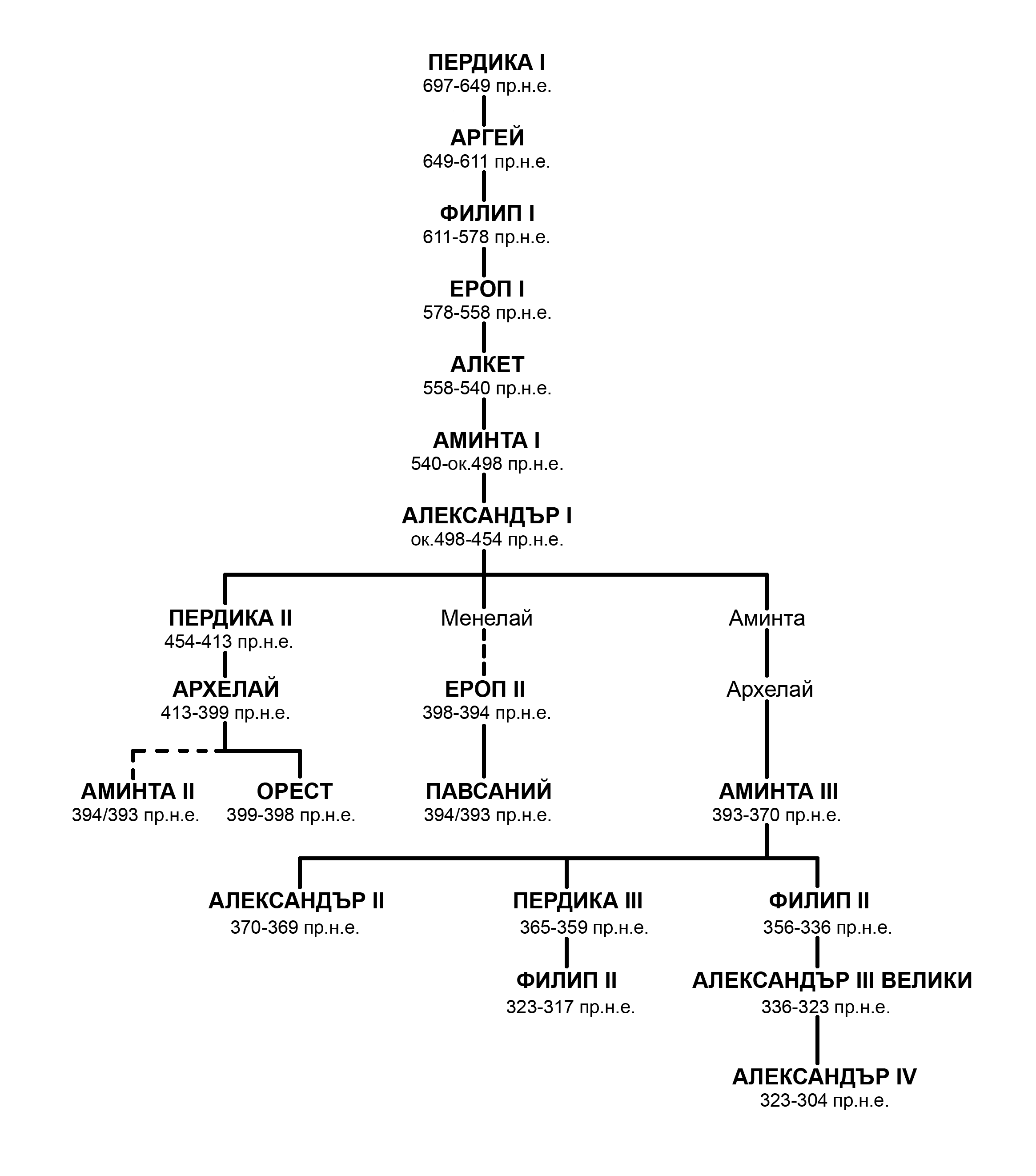 Родословно дърво на Аргеадската династия (Древна Македония)